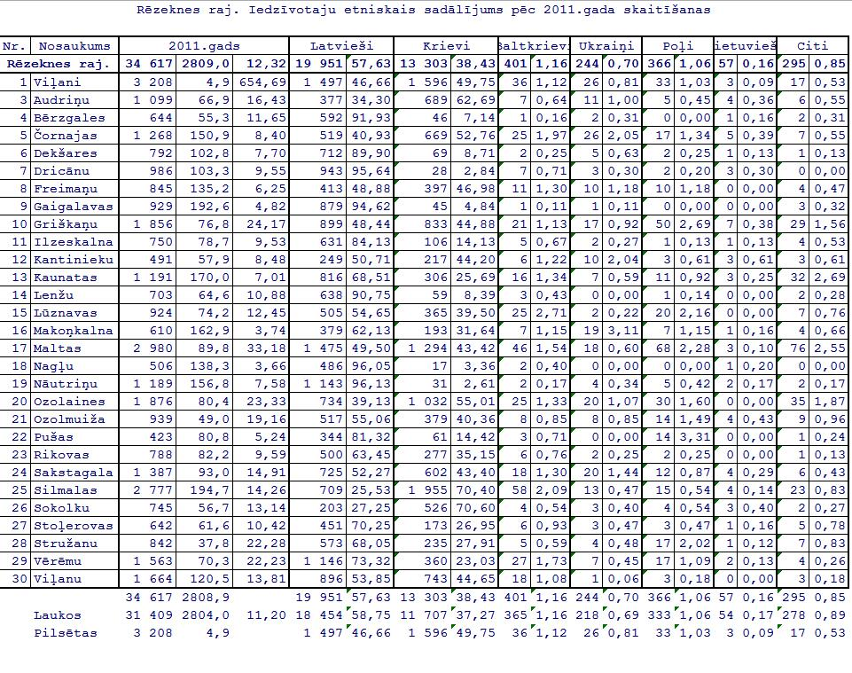 Latvijas 2011 gada tautas skaitīšanas dati